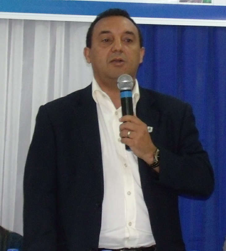 Professor Dr. Nouga Batista Cardoso, reitor da Universidade Estadual do Piauí. Possui graduação em Licenciatura Plena em Ciências pela Universidade Federal do Piauí (1992), mestrado em Química (Química Analítica) pela Universidade de São Paulo (1995) e doutorado em Química (Físico-Química) pela Universidade de São Paulo (1999). Atualmente é professor Associado - DE da Universidade Estadual do Piauí. Reitor eleito da UESPI (2014/2017). (Fonte